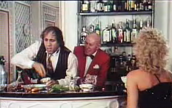 Schermata del film Grand Hotel Excelsior